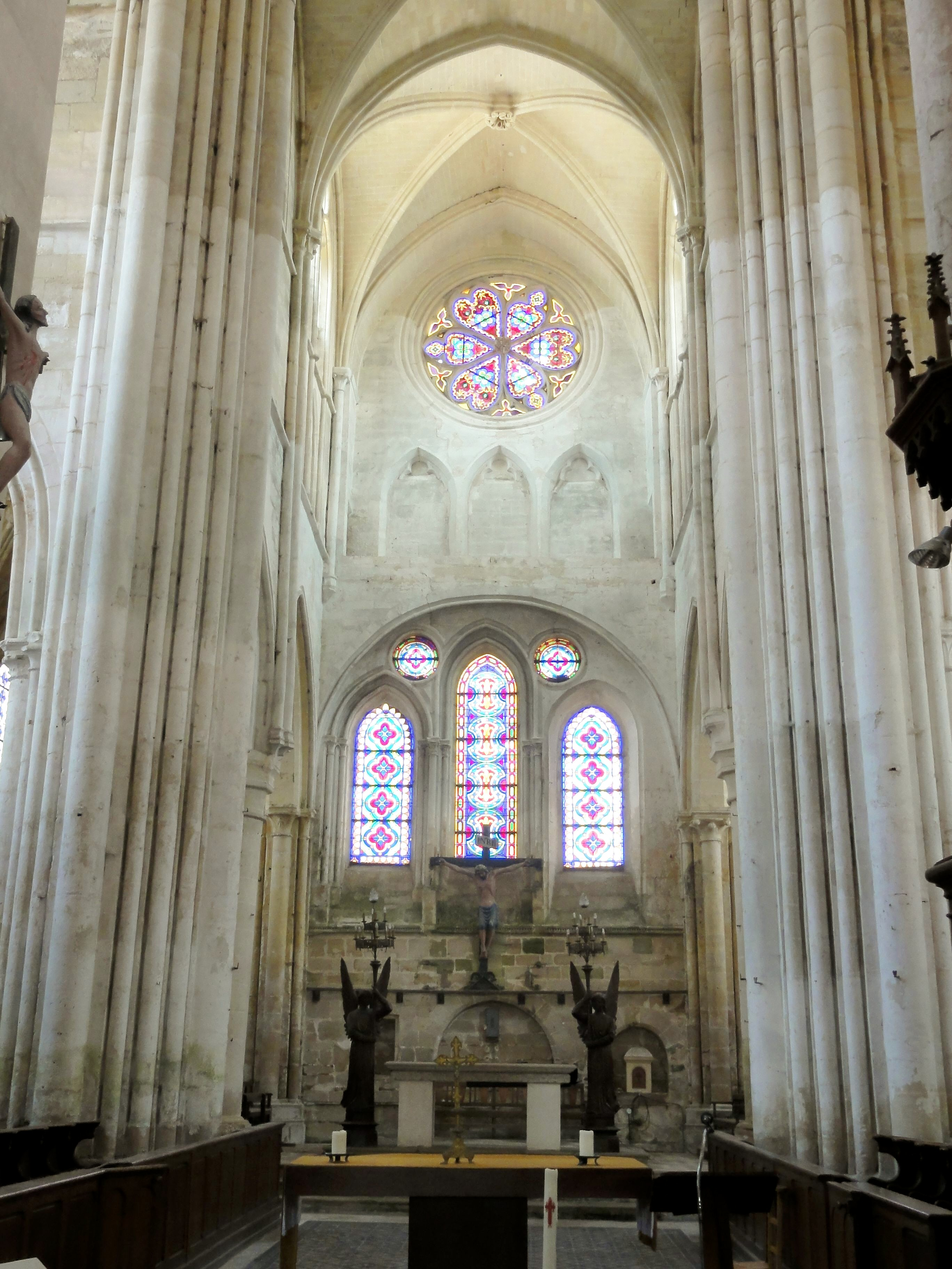 Croisée du transept, vue vers l'est.